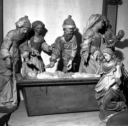 Le Relecq-Kerhuon : église Notre-Dame, Mise au Tombeau [J. Le Doaré, base Mistral]